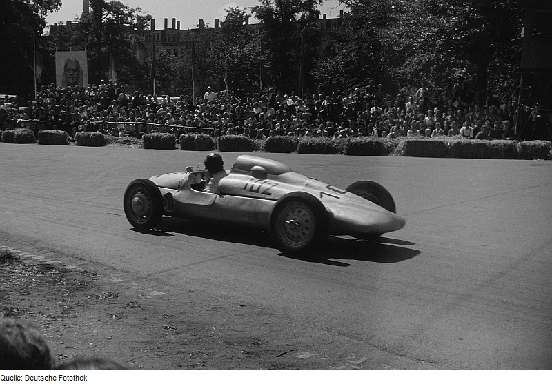 Original image description from the Deutsche Fotothek Stadtparkrennen "Rund um das Scheibenholz"